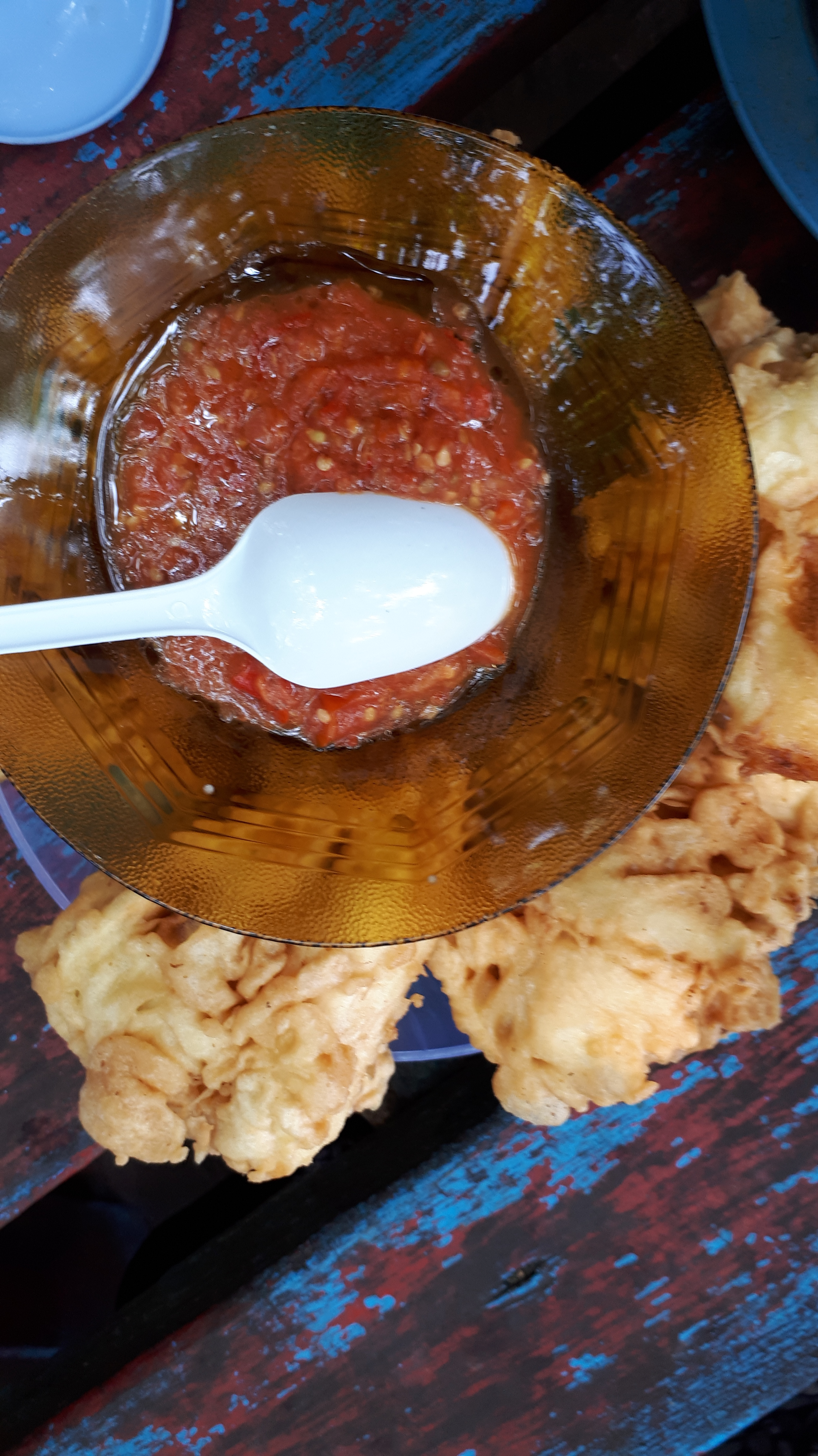 Di Manado, pisang goreng biasa dimakan dengan cocolan Sambal Roa. Pisang kepok yang tidak terlalu matang dilumuri tepung digoreng berbentuk kipas. Sambal Roa dibuat menggunakan bahan utama ikan Roa asap ditumbuk beserta cabai, bawang merah, bawang putih, jahe, lengkuas, daun kemangi, daun jeruk, daun salam, dan garam. Cita rasa dari makanan ini adalah gurih pedas.